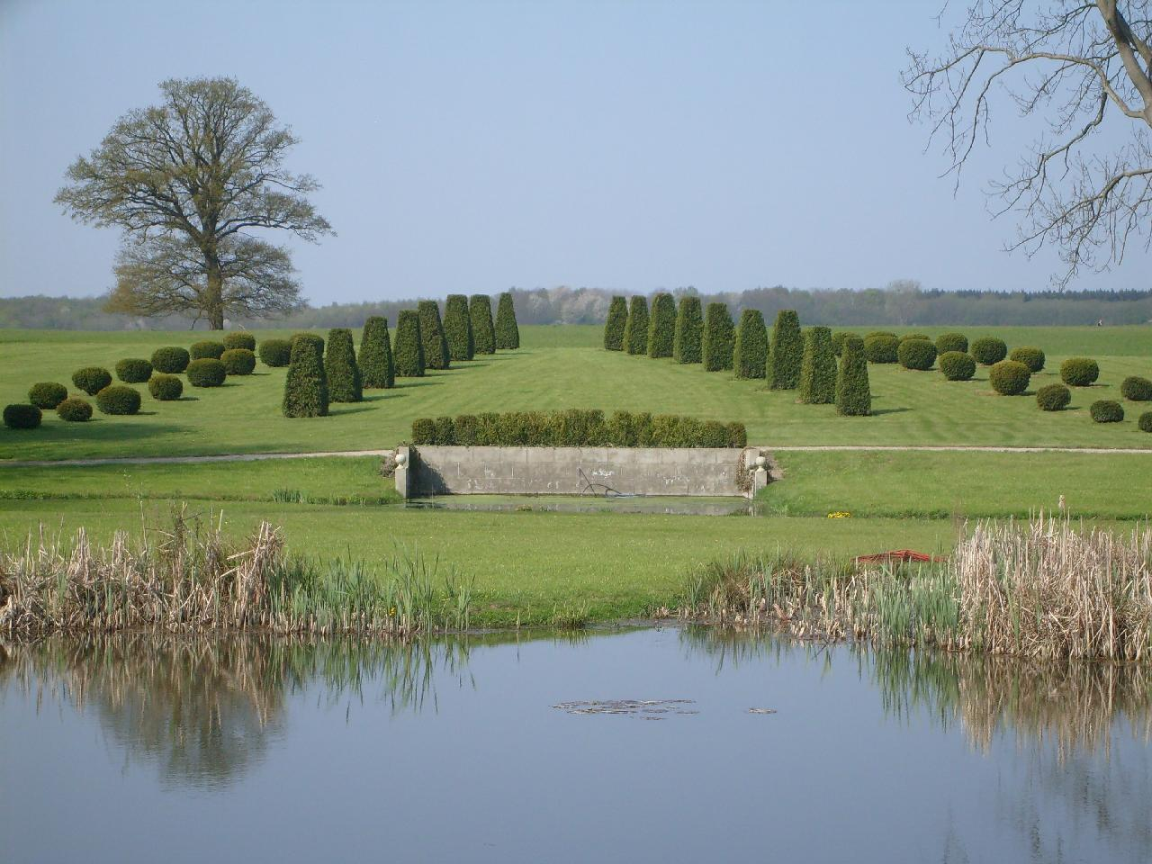 Garten von Marihn, Außenstandort der Bundesgartenschau 2009 in Schwerin